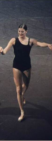 Marie-Agnès Gillot durant le salut de Pas./Parts de William Forsythe à l'Opéra Garnier en 2013.